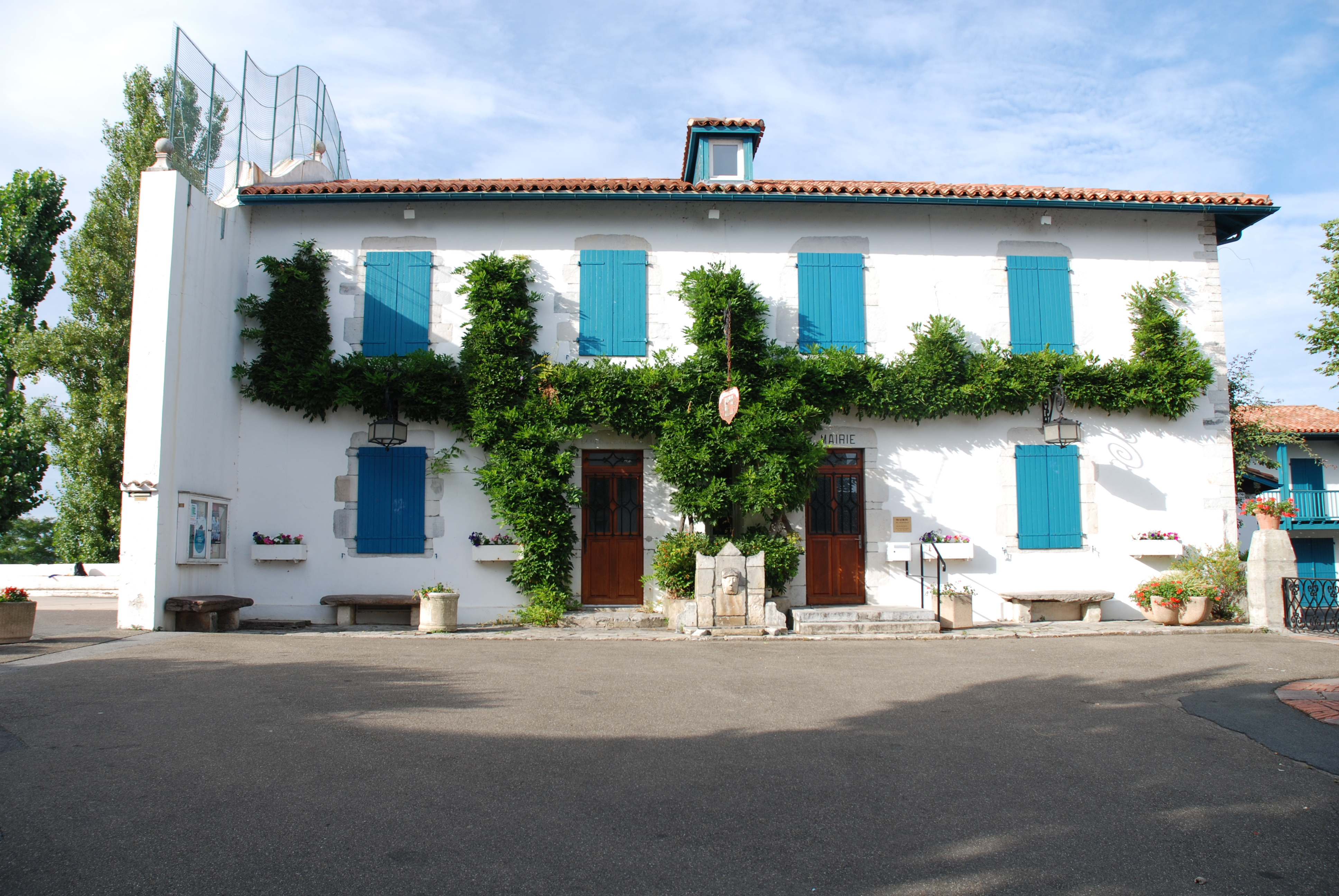 Arcangues, la mairie